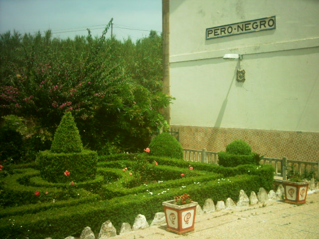 Estação ferroviária de Pero Negro